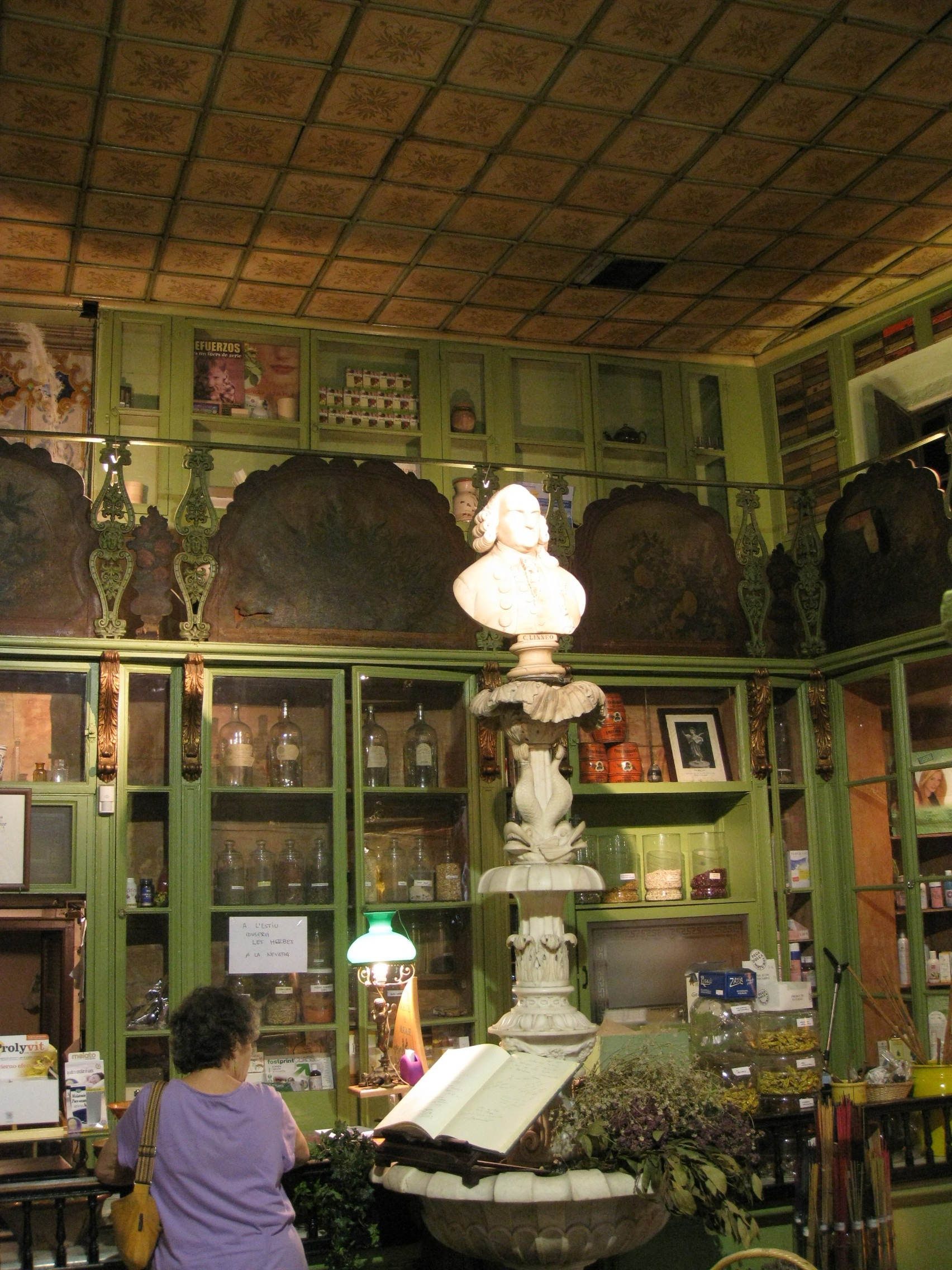 Herboristeria del Rei, la botiga d'herbes més antiga de Barcelona (1823), al barri Gòtic. La va decorar el pintor i escenògraf Francesc Soler i Rovirosa (1858) i a l'interior hi destaca una font amb el bust de Linné, dels germans Baratta.